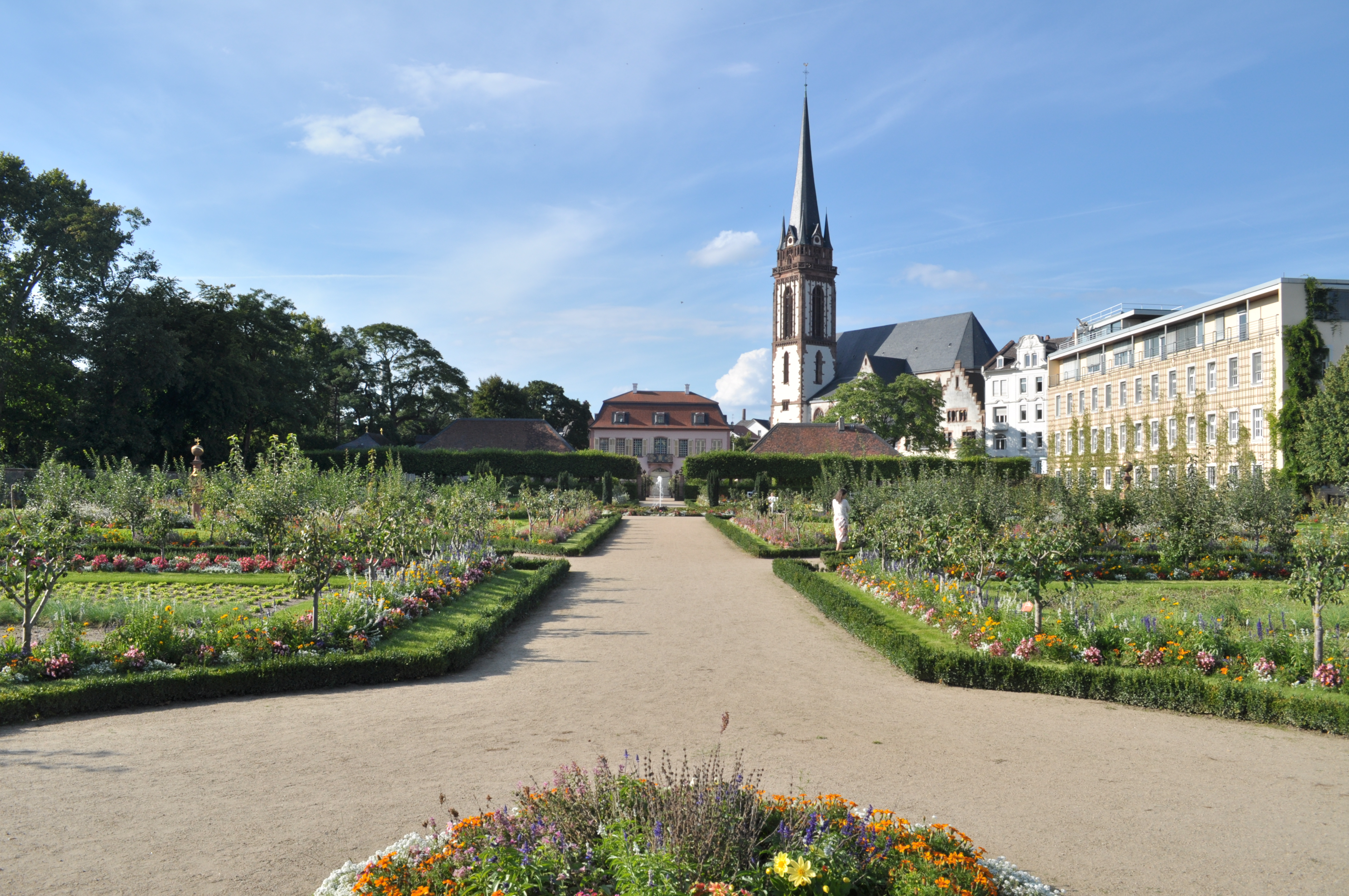 Bild aus Prinz-Georgs-Garten mit Blick auf Martinskirche im Darmstädter Martinsviertel